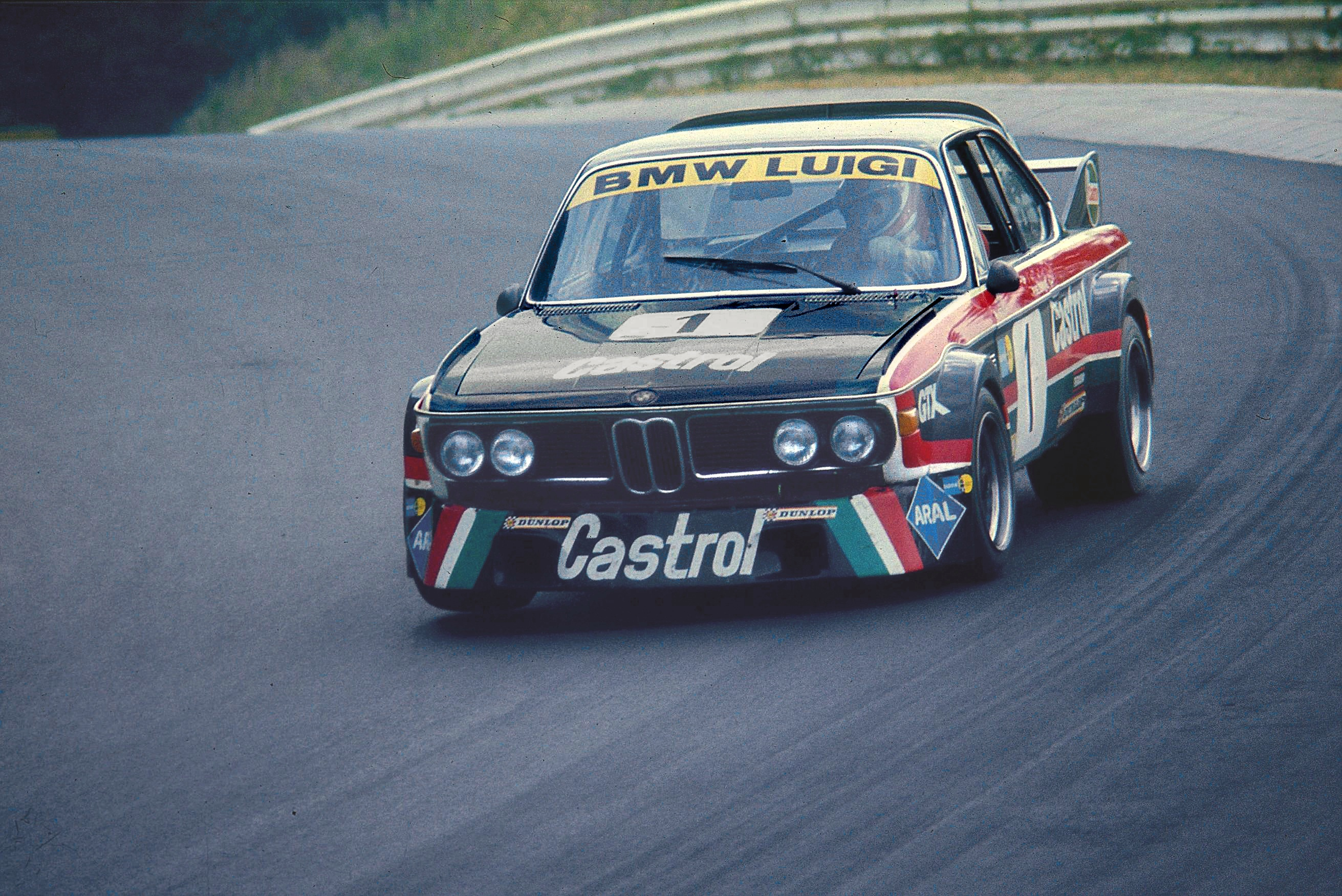 BMW CSL von Stuck, Xhenceval und Dieudonné beim Training zum 6-Stunden-Rennen auf dem Nürburgring 1973, Streckenabschnitt Hohe Acht; Fahrer im Bild: Jean Xhenceval; Team Luigi-Racing, Belgien; Daten des Wagens: BMW-6-Zylinder, 3195,5 cm³, 340 PS bei 7400/min, Leergewicht 1050 kg, Höchstgeschwindigkeit bei längster Übersetzung: 270 km/h